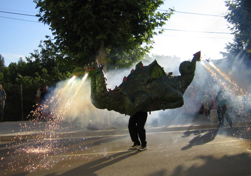 Drac Draqui Fogueró, de la Llacuna